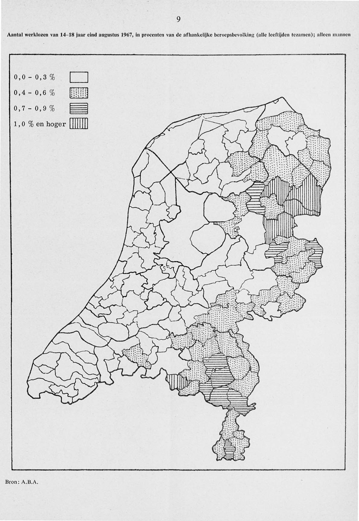 Behoort bij de nota betreffende de jeugdwerkloosheid